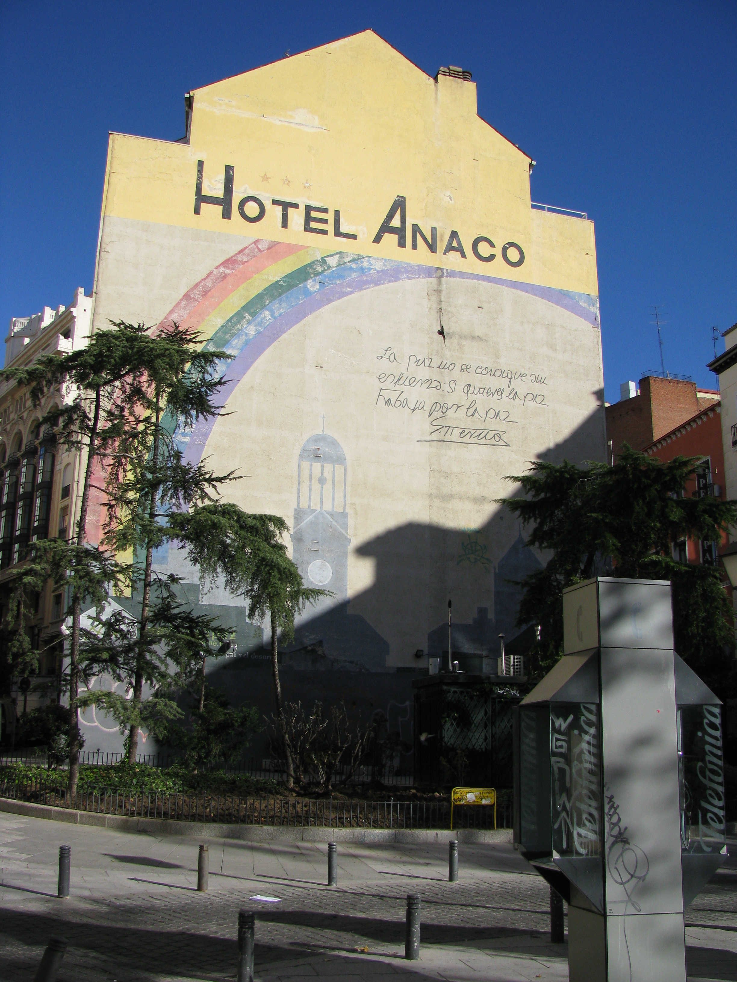 Plaza del Carmen, Madrid, España.